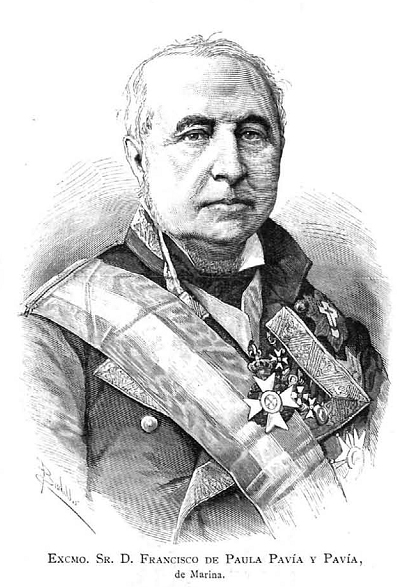 Retrato de Francisco de Paula Pavía y Pavía, publicado en la revista española La Ilustración Española y Americana.